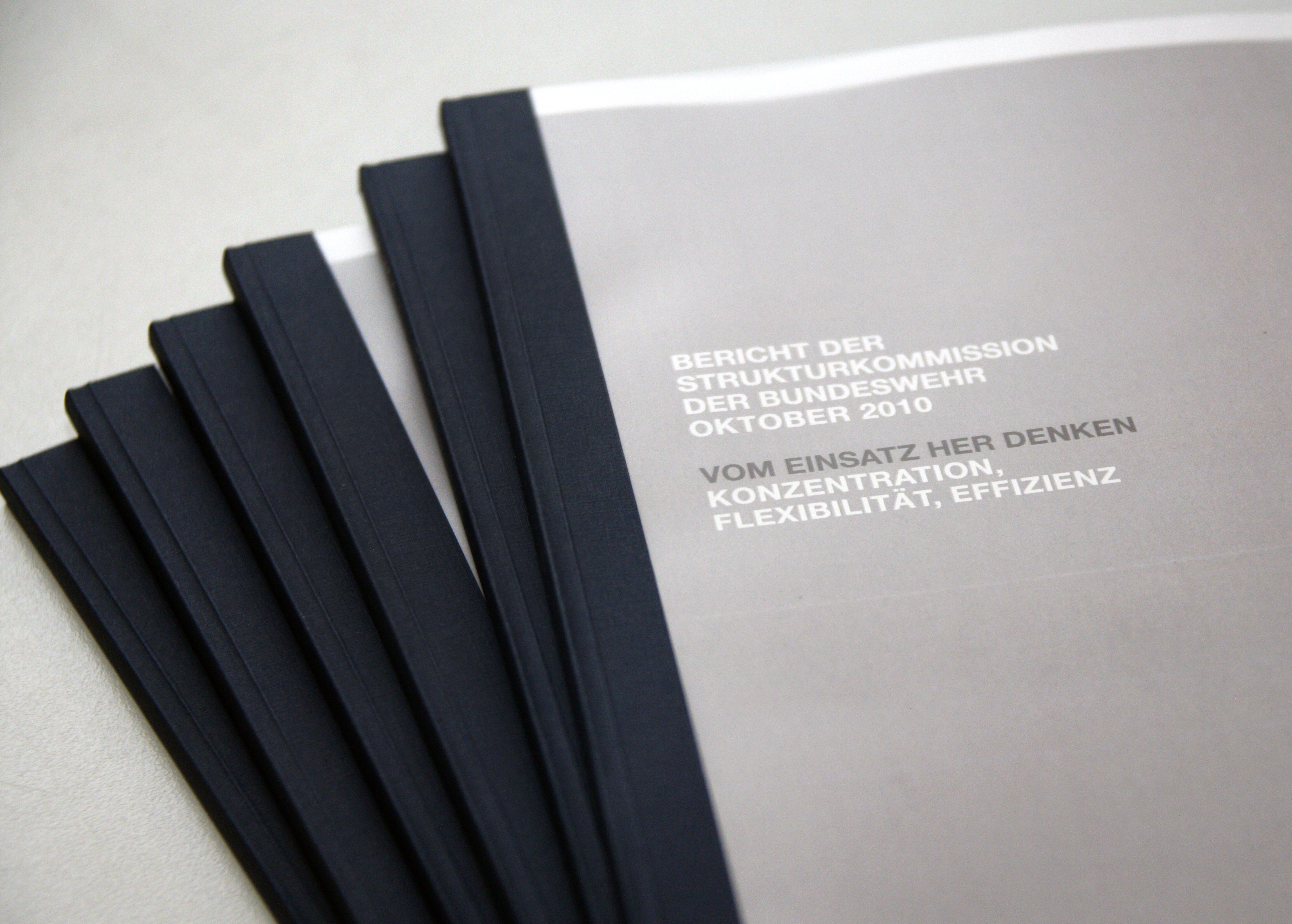 Dem Bundesminister der Verteidigung Karl-Theodor zu Guttenberg wird der Abschlussbericht der Strukturkommission durch den Leiter der Strukturkommission , Frank-Jürgen Weise übergeben. Foto: Bundeswehr/Bienert